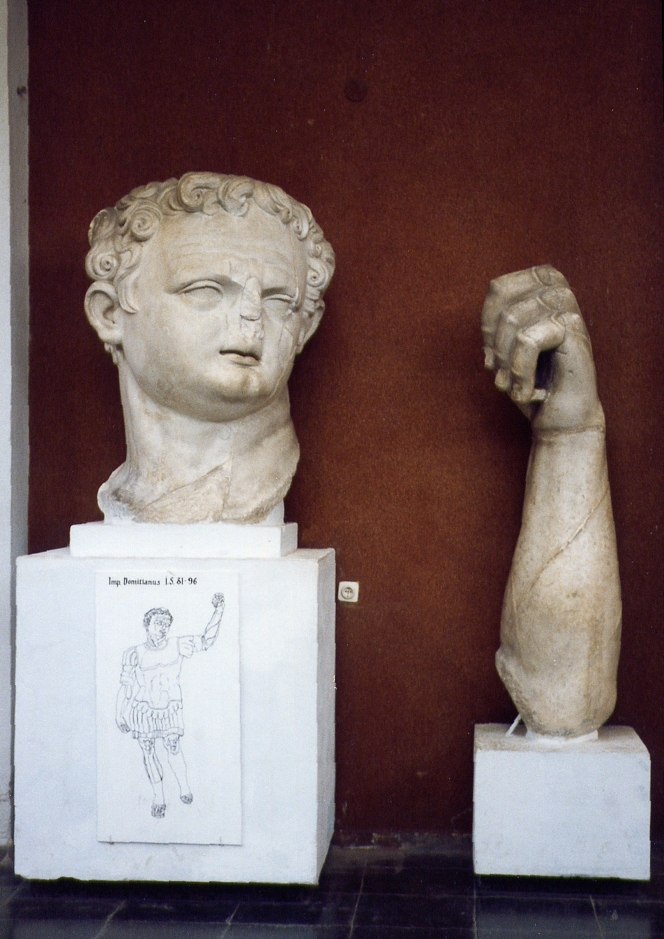 Fragmente einer Monumentalstatue des Domitian, Ephesus-Museum Selçuk, Westtürkei